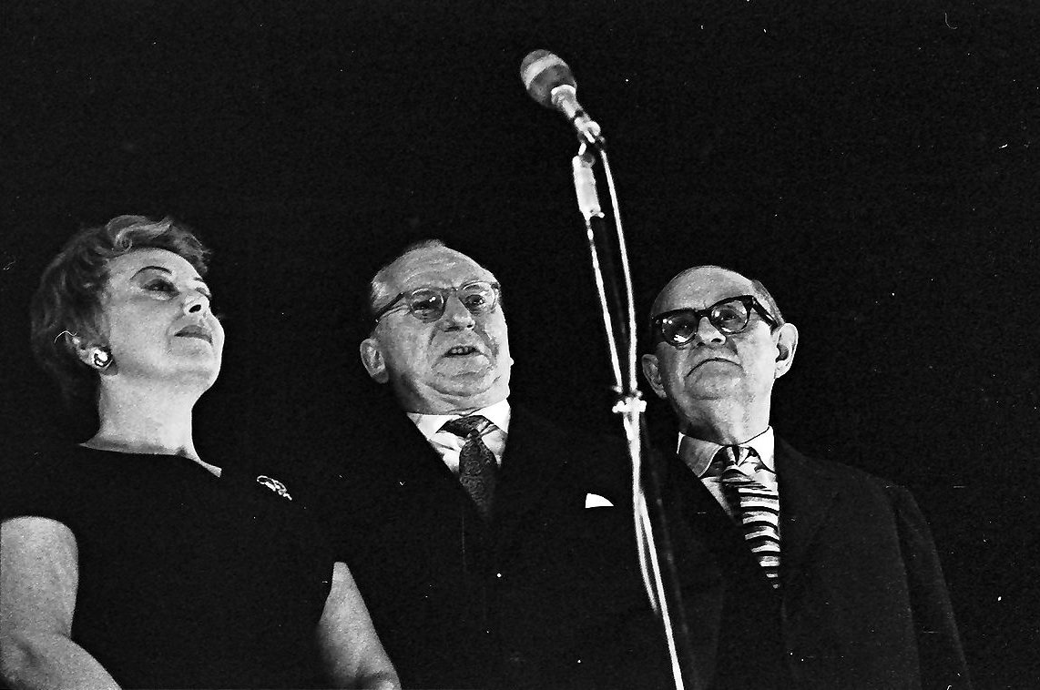 Freiburg: Stadthalle; Die Insulaner; Edith Schollwer, Bruno Fritz, Ewald Wenck (v.l.n.r.)